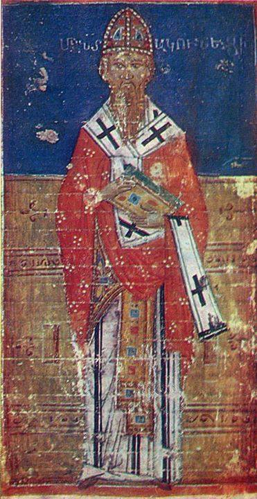 Иоанн Мандакуни, армянская минатюра